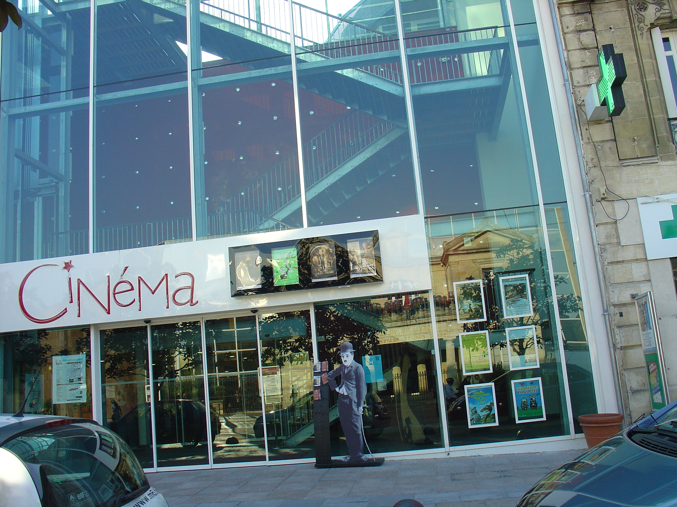 Photo du cinéma Jean Eustache à Pessac prise en mars 2007 par Carmen Buze La mairie se reflète sur la vitre...